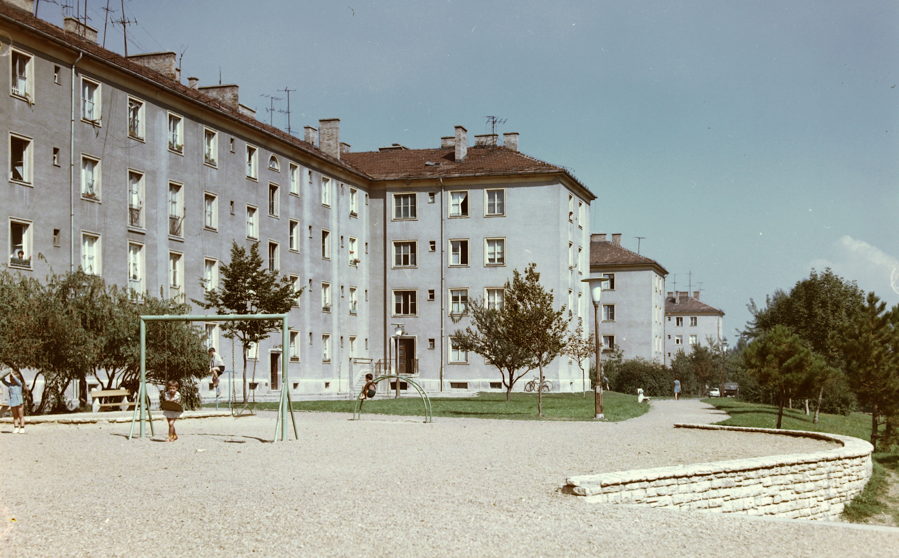 Építők útján álló házak hátsó frontja. Location: Hungary Tags: colorful, playground, swing, monkey bar Title: Építők útján álló házak hátsó frontja.